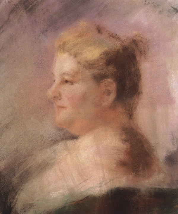 Retrato de Emilia Pardo Bazán y de la Rúa, 1897. Casa Museo Emilia Pardo Bazán. Real Academia Galega.